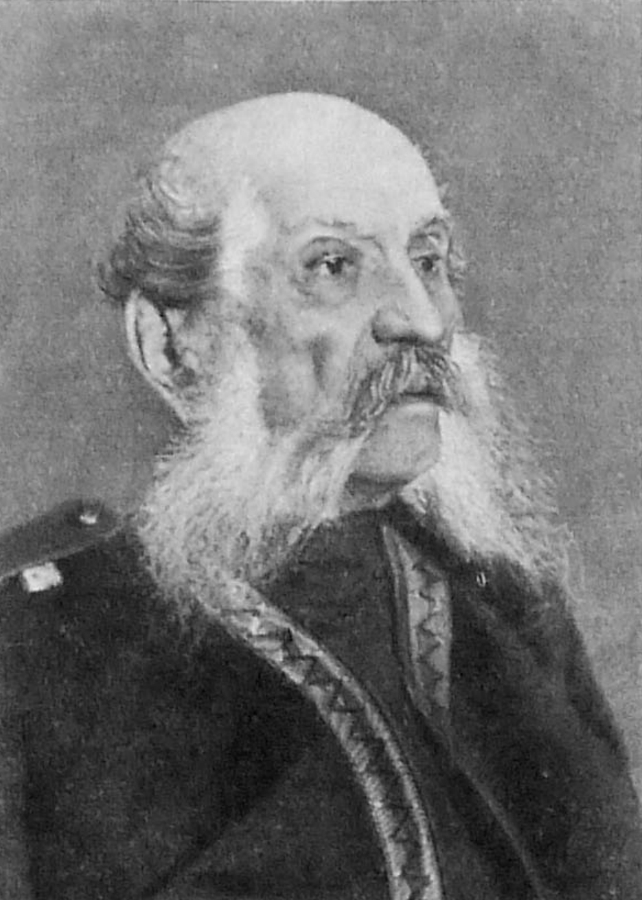 Евге́ний Васи́льевич Богдано́вич (26 февраля (10 марта) 1829 — 1 (14) сентября) 1914, Ялта) — генерал от инфантерии, писатель; портрет 1893 г.